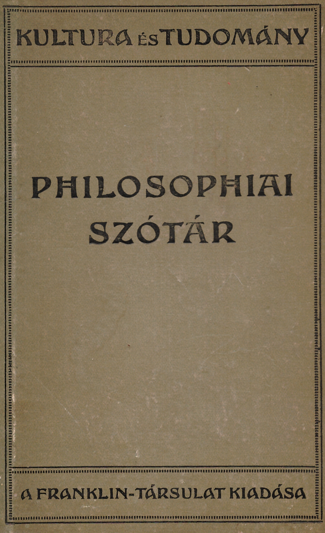 Enyvvári Jenő Philosophiai szótár (1923)